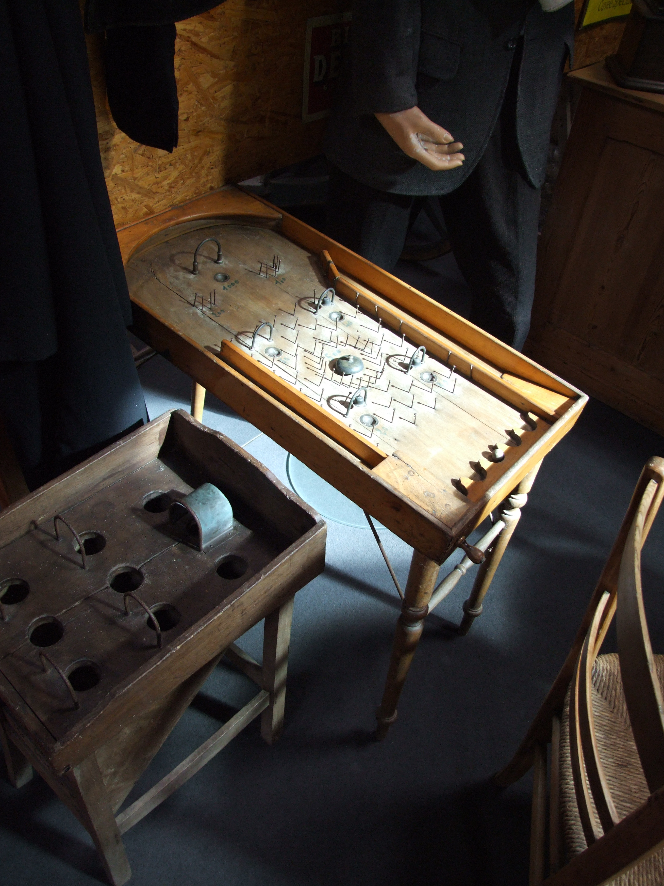 Écomusée du Bommelaers-Wall: traditionelle flämische Spiele. links im Schatten ein einfaches Jeu de la Grenouille, im Licht ein Vorläufer des Flipperautomaten, noch als reines Glücksspiel.